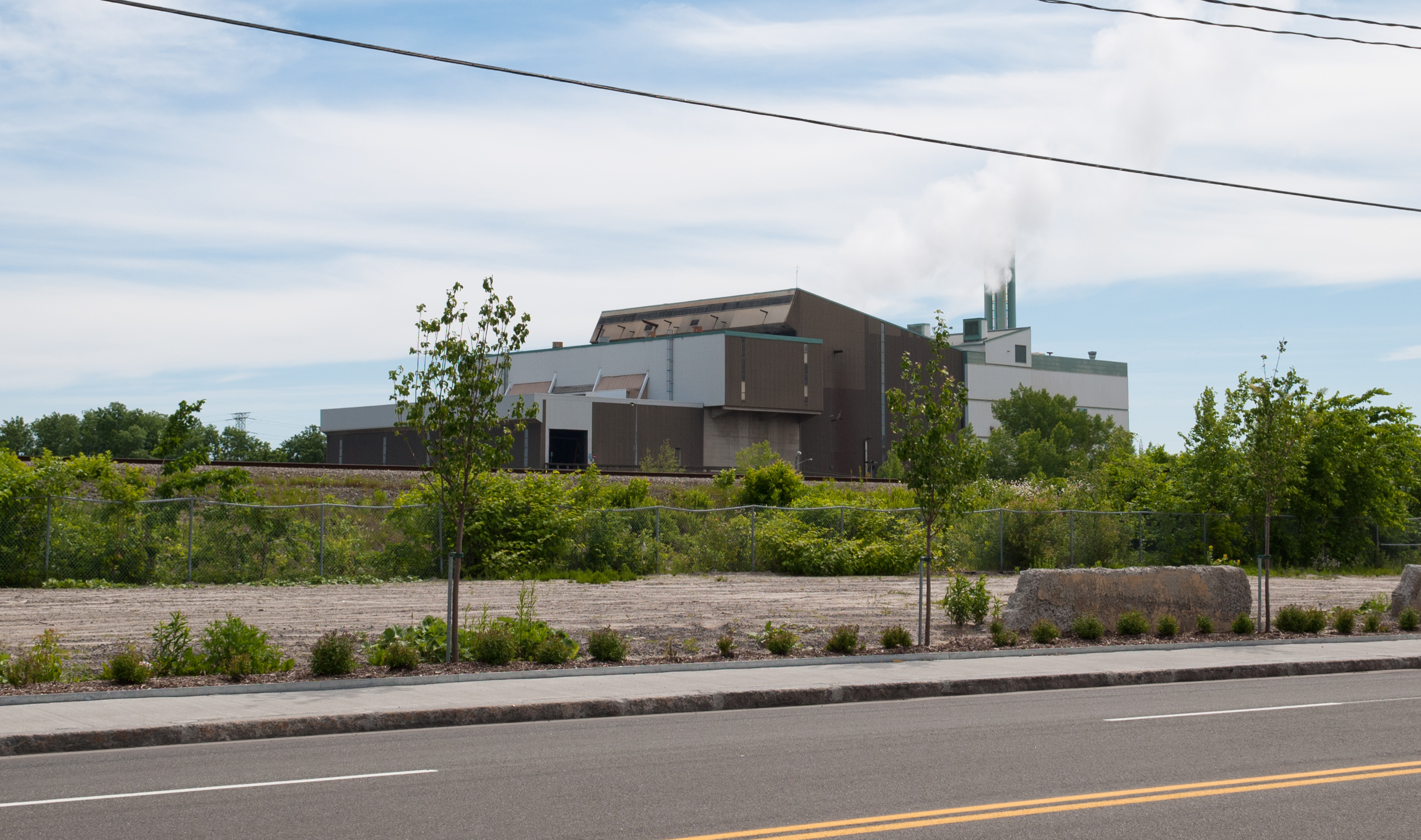 Incinérateur de la ville de Québec, sur la rue Montmorency dans l'arrondissement La Cité-Limoilou de la ville de Québec (quartier Maizeret).